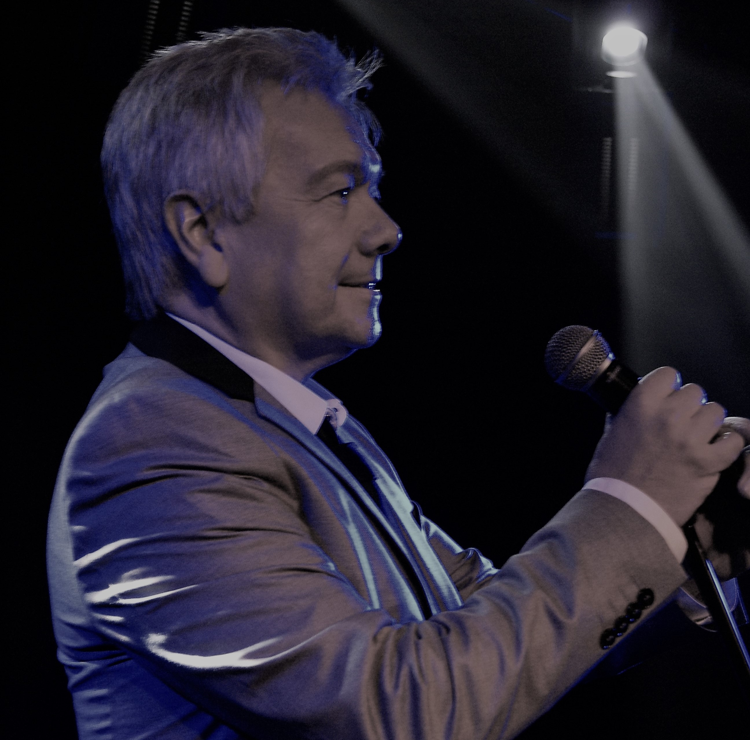 zanger